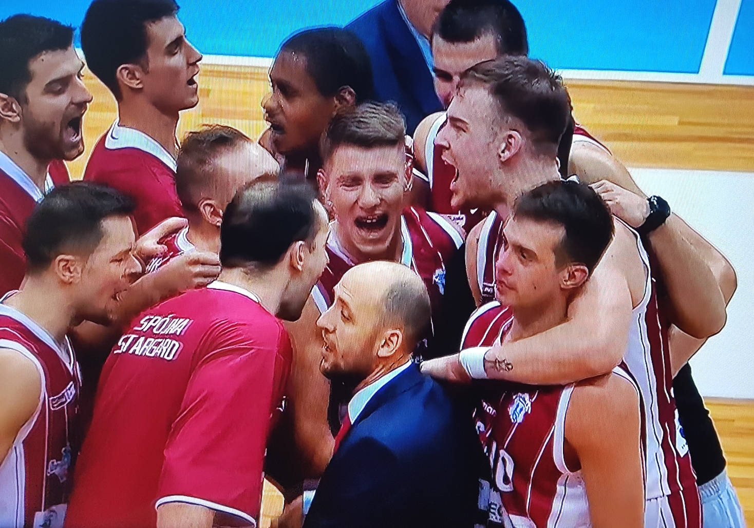 Spójnia Stargard w Sopocie (27.01.2019)